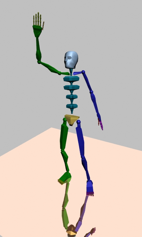 3ds Maxi standardluustik